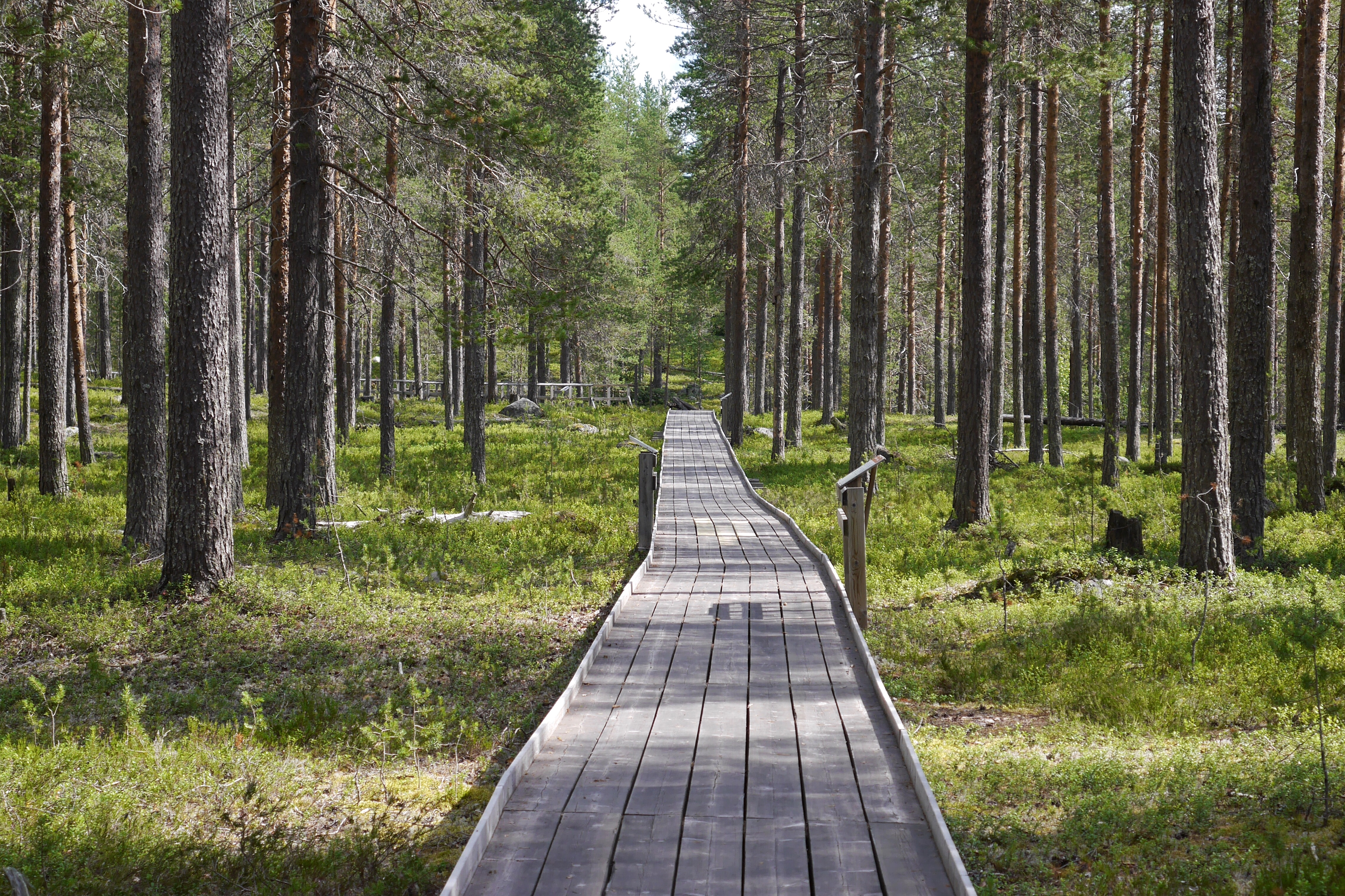 Fattenborg är ett naturreservat i Töre socken, Kalix kommun. I området finns ett stort antal gravar/stensättningar, boplatsvallar och gångsystem från den äldre bronsåldern. Spång över tallhed. Bild tagen sommaren 2016.